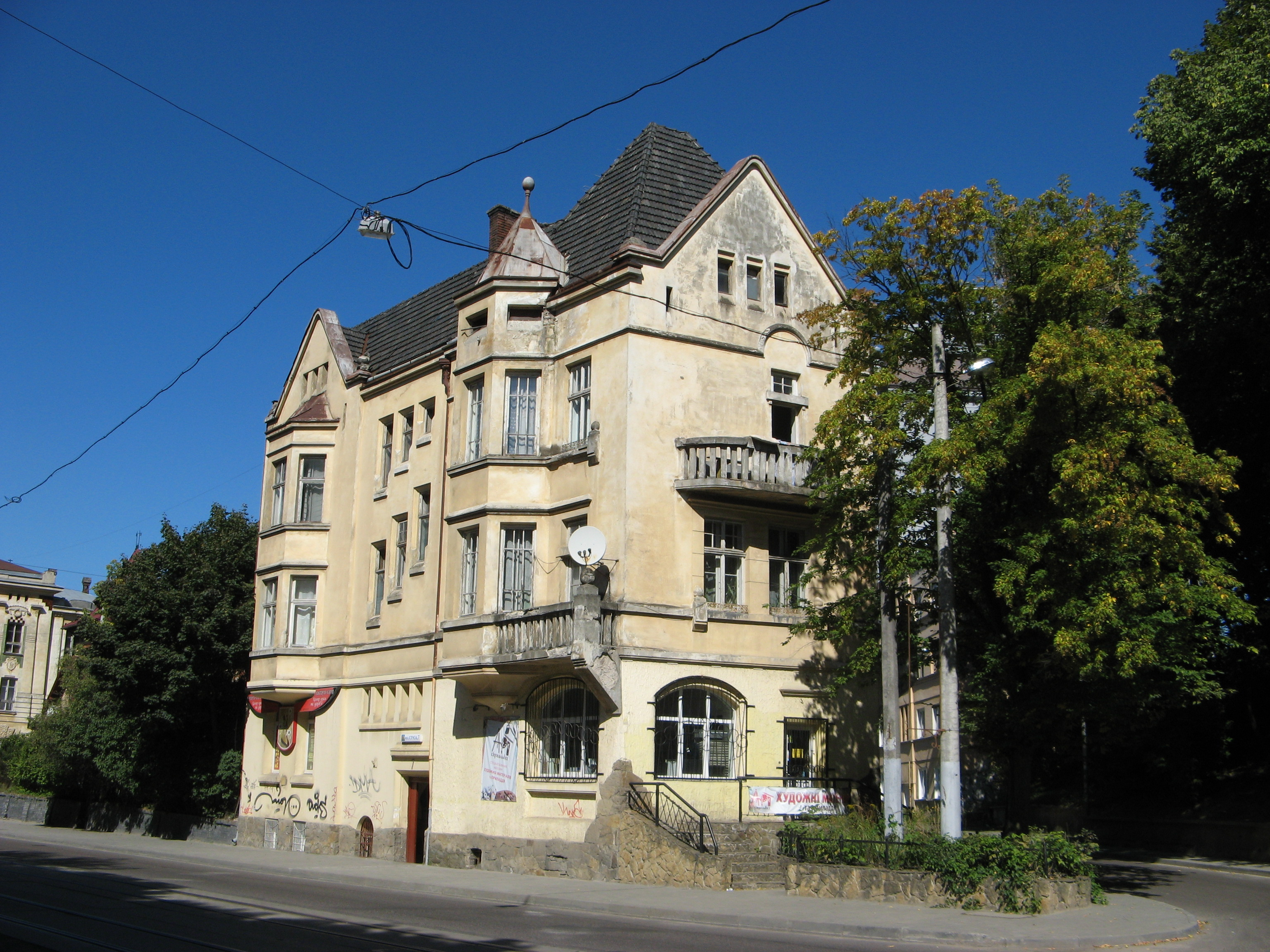 7 Stusa Street, Lviv